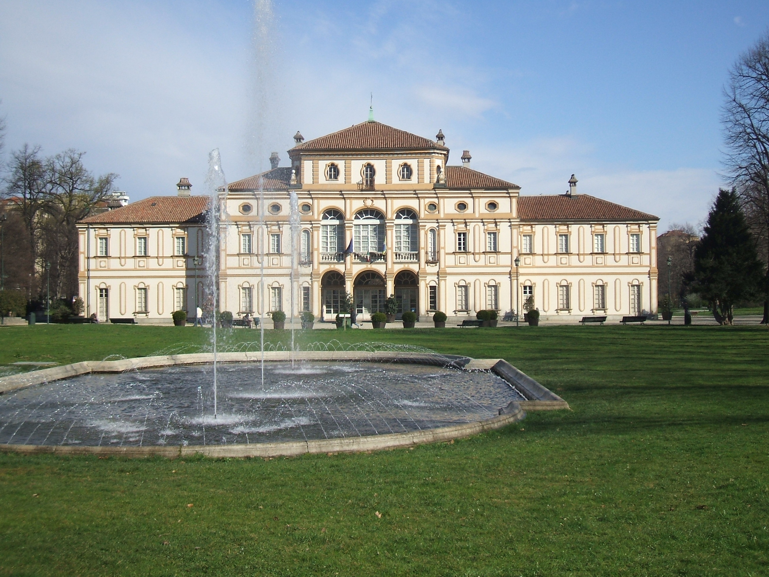 Villa La Tesoriera, Torino, veduta della facciata principale